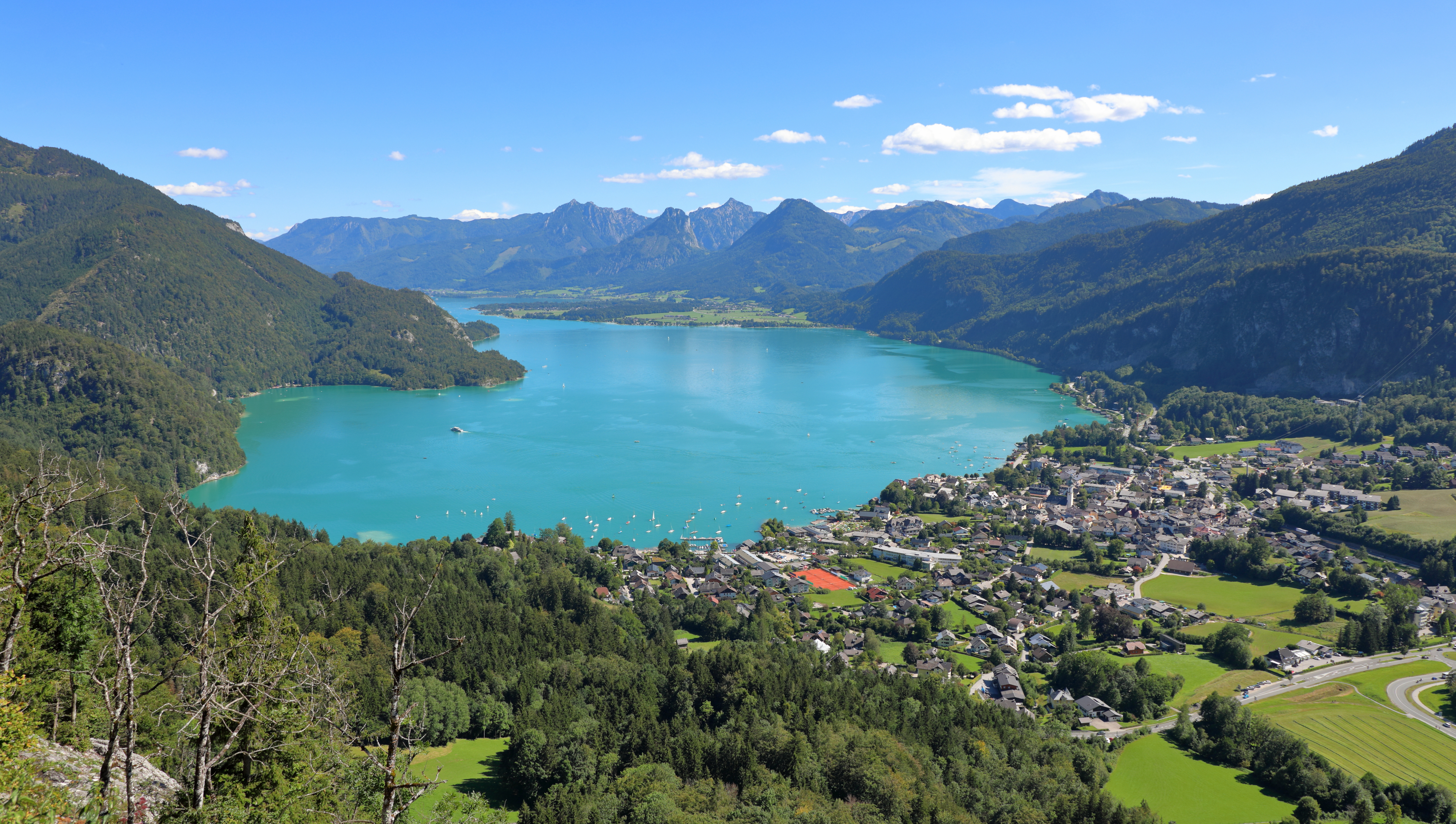 Blick vom Plombergstein bzw. den 830 m hohen Steinklüfte in Richtung Südosten auf den Wolfgangsee und die Salzburger Gemeinde St. Gilgen (rechts unten).